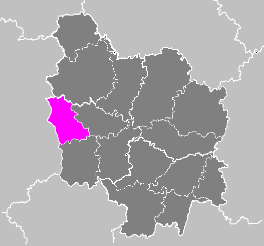 Maps of arrondissements and cantons of France: Arrondissement de Cosne-Cours-sur-Loire.PNG (Région Bourgogne)